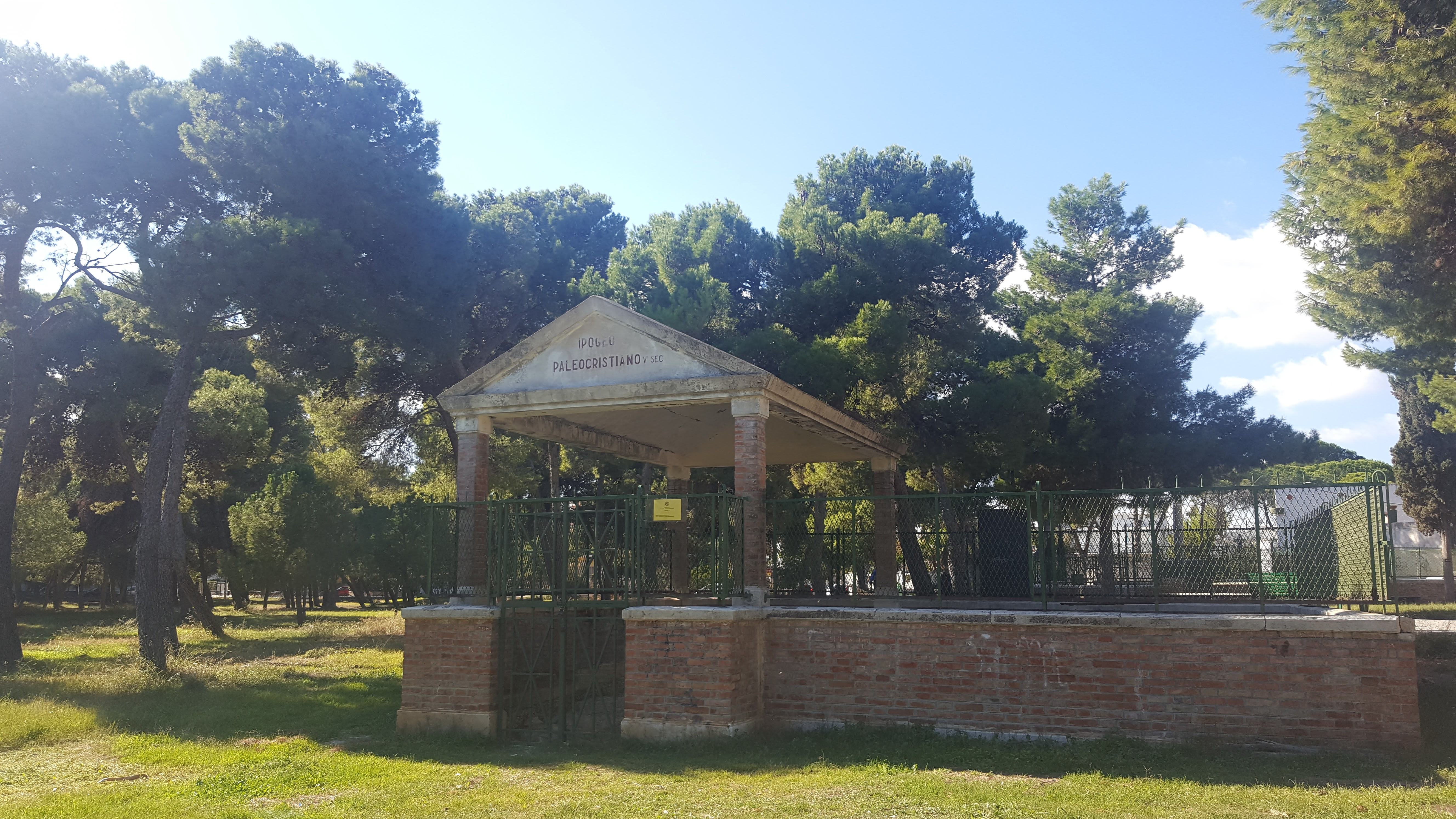 recinto